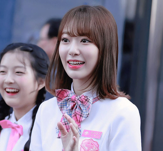 180510 상암 미야와키 사쿠라